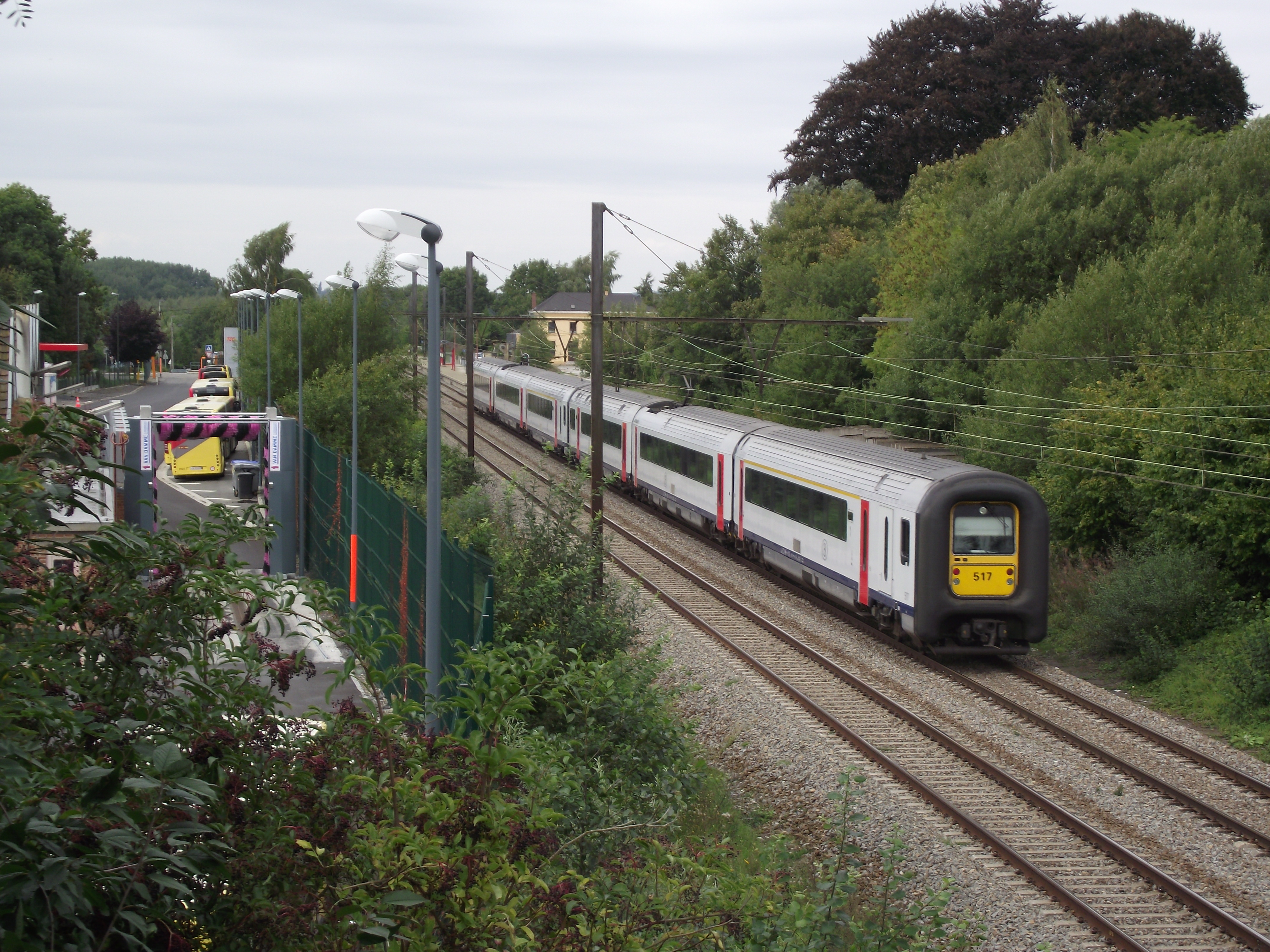 Zicht op spoorlijn 161 bij Chastre. Links een TEC stelplaats en vroegere buurtspoorstelplaats. Foto genomen vanaf de vroegere buurtspoorwegbrug over de spoorlijn.